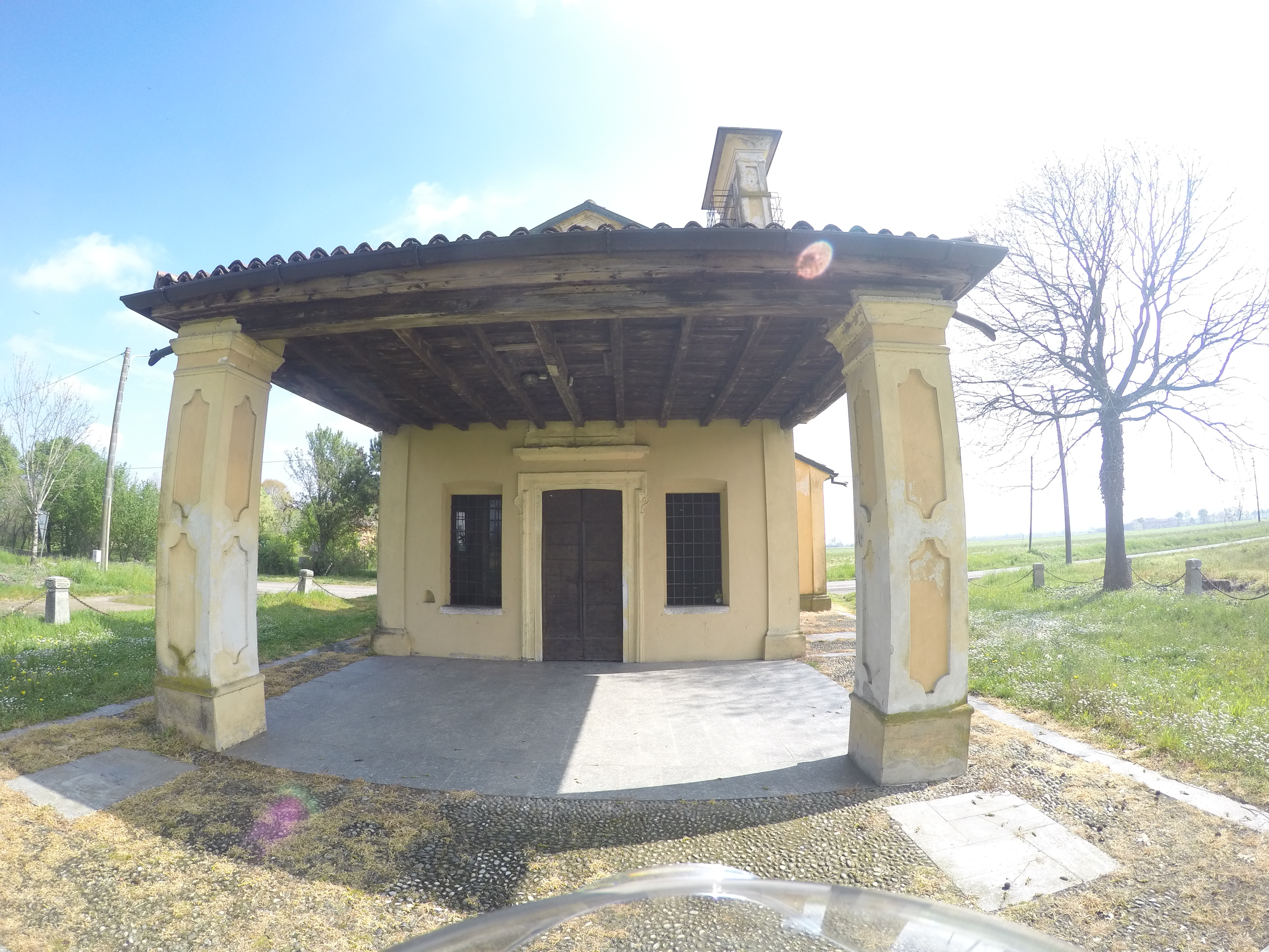 Gudo Visconti - Località La Gaggianese